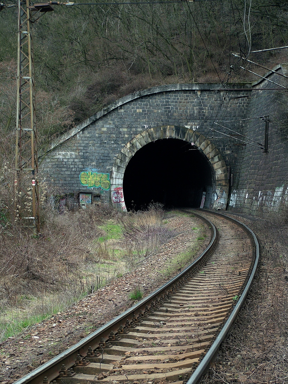 Tunel v Malé Chuchli, vjezd od severu.